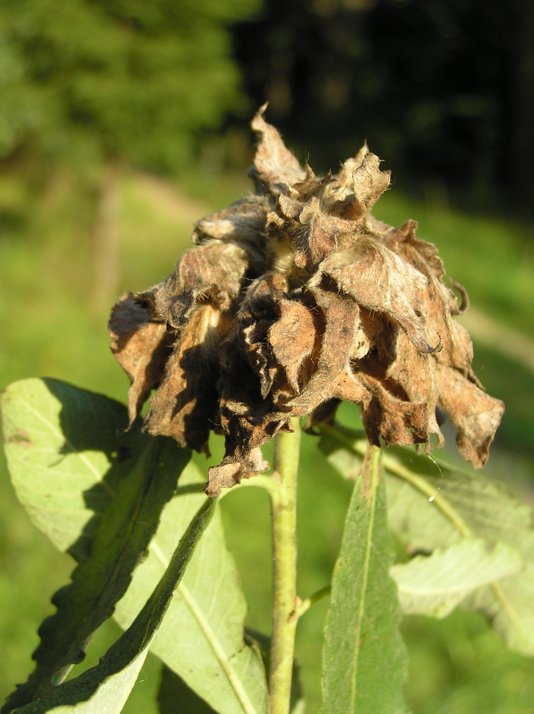 Rhabdophaga rosaria L.; (Wierzbinowiec rozetkowiec) Białowieża, Polska